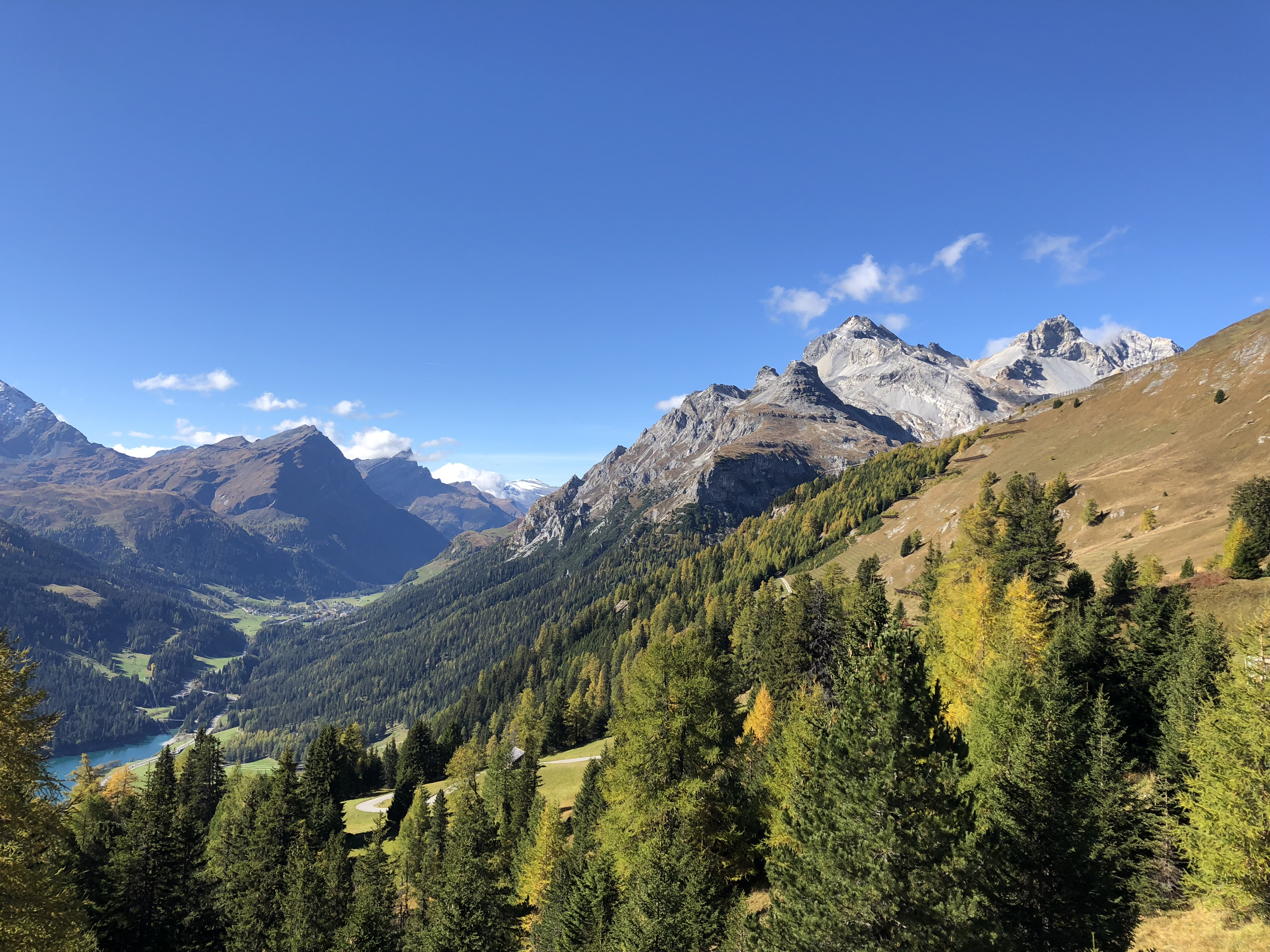 Teurihorn Ansicht von Osten, links unten der Sufnersee